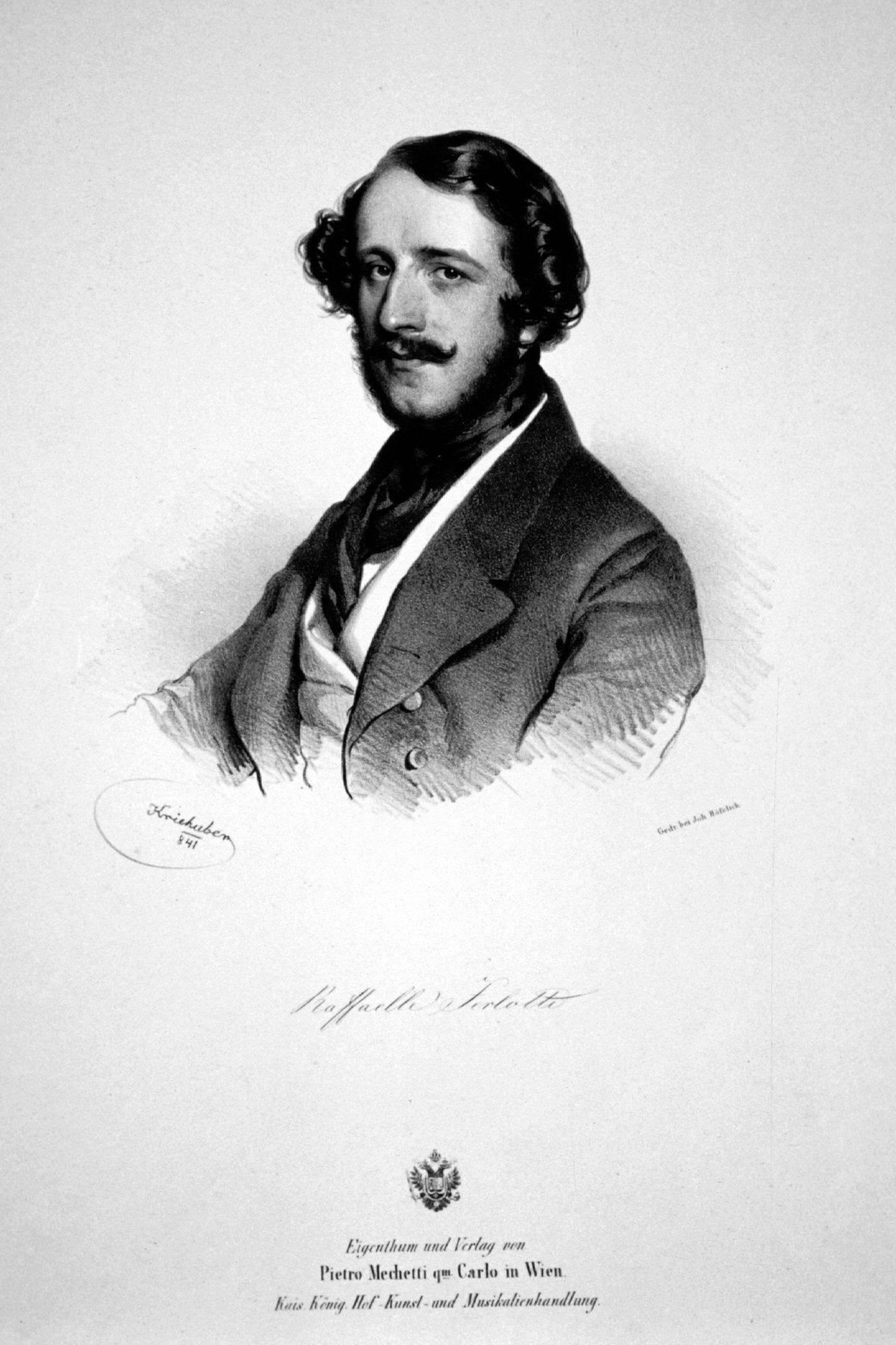 Raffaele Ferlotti (1819-1891), italienischer Bariton